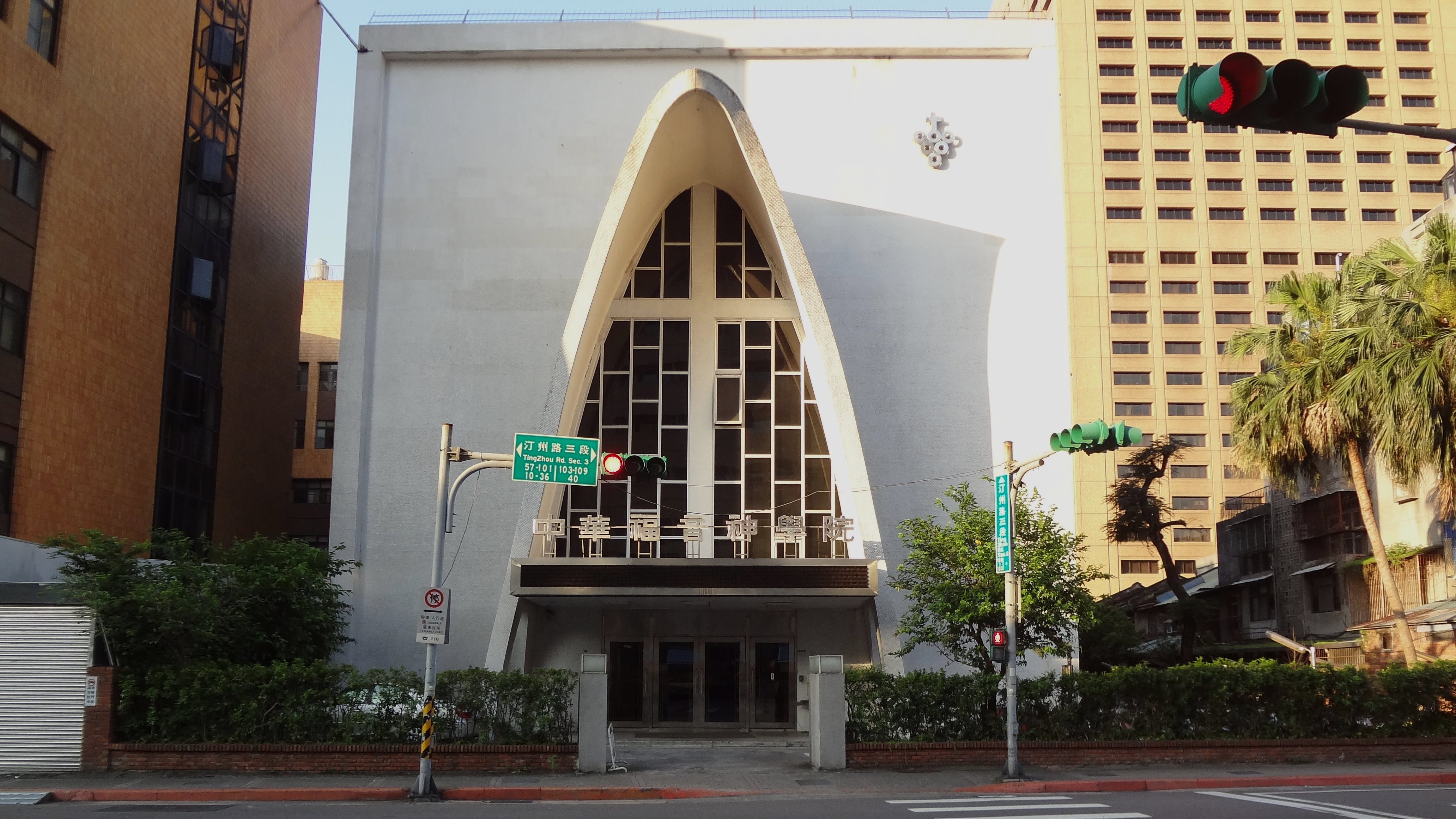 中文（台灣）: 中華福音神學院，位於臺北市中正區汀州路三段101號。